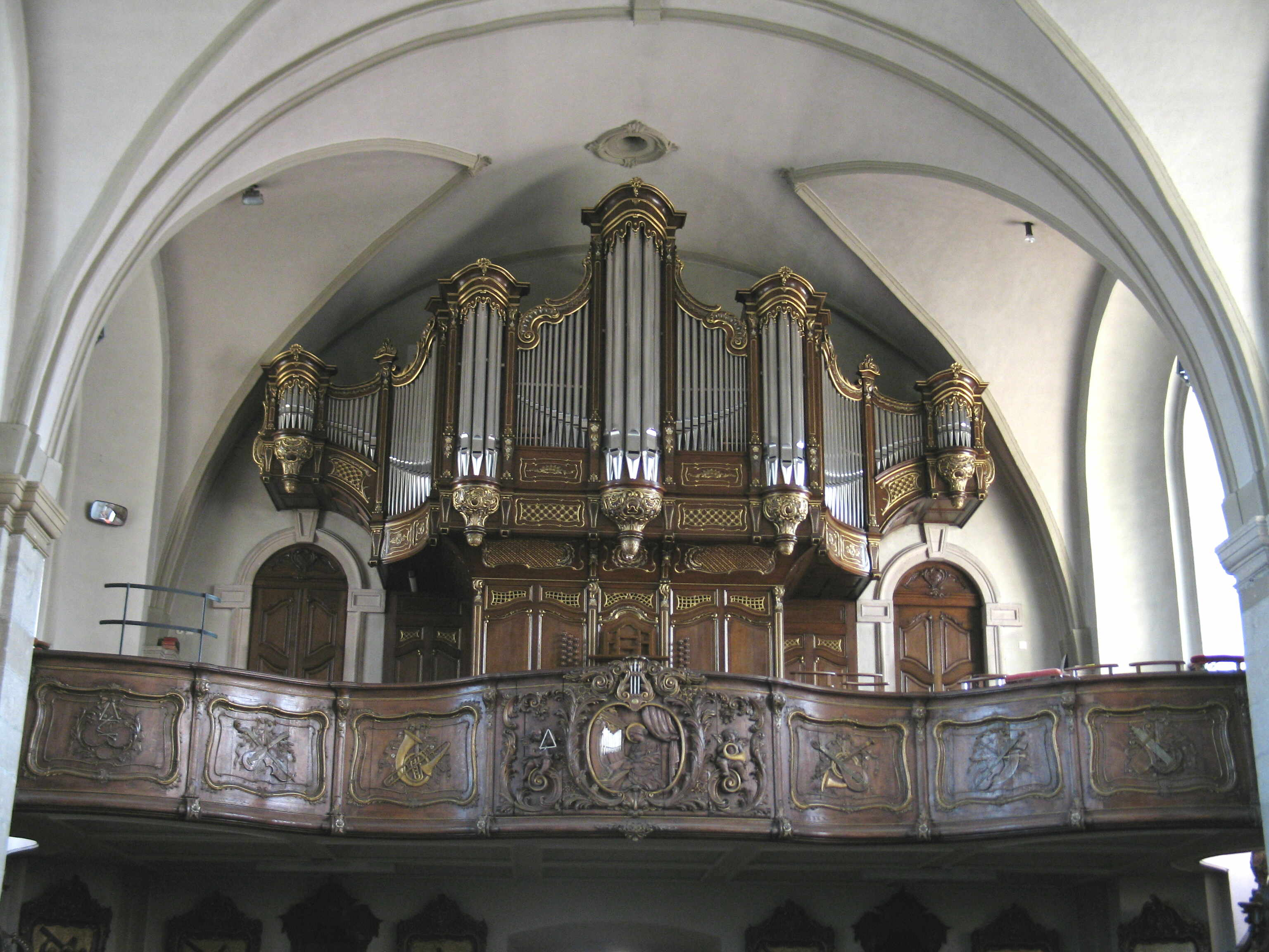 Duxall mat Uergel an der Kierch zu Munneref.